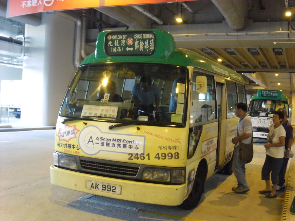 中文（香港）: 九龍專線小巴86線，以啟德郵輪碼頭為總站